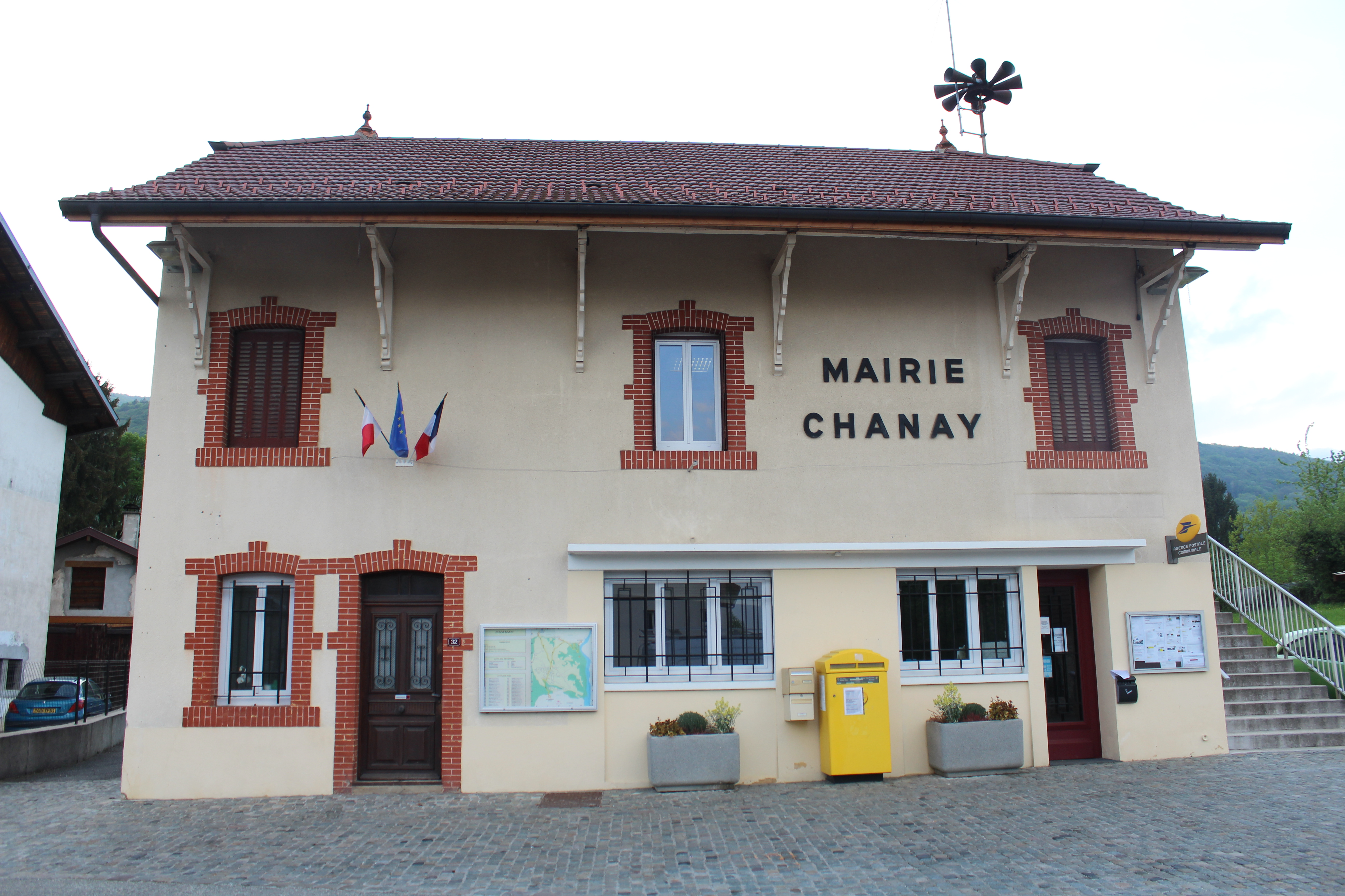 Mairie de Chanay.